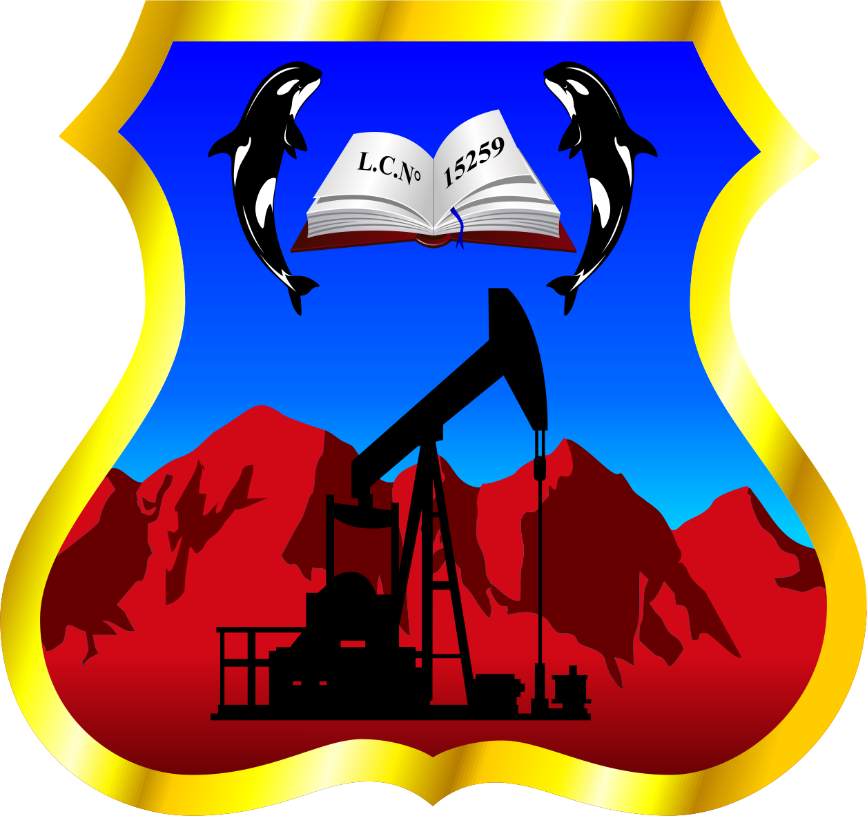 Distrito de Los Órganos - Provincia de Talara - Región Piura